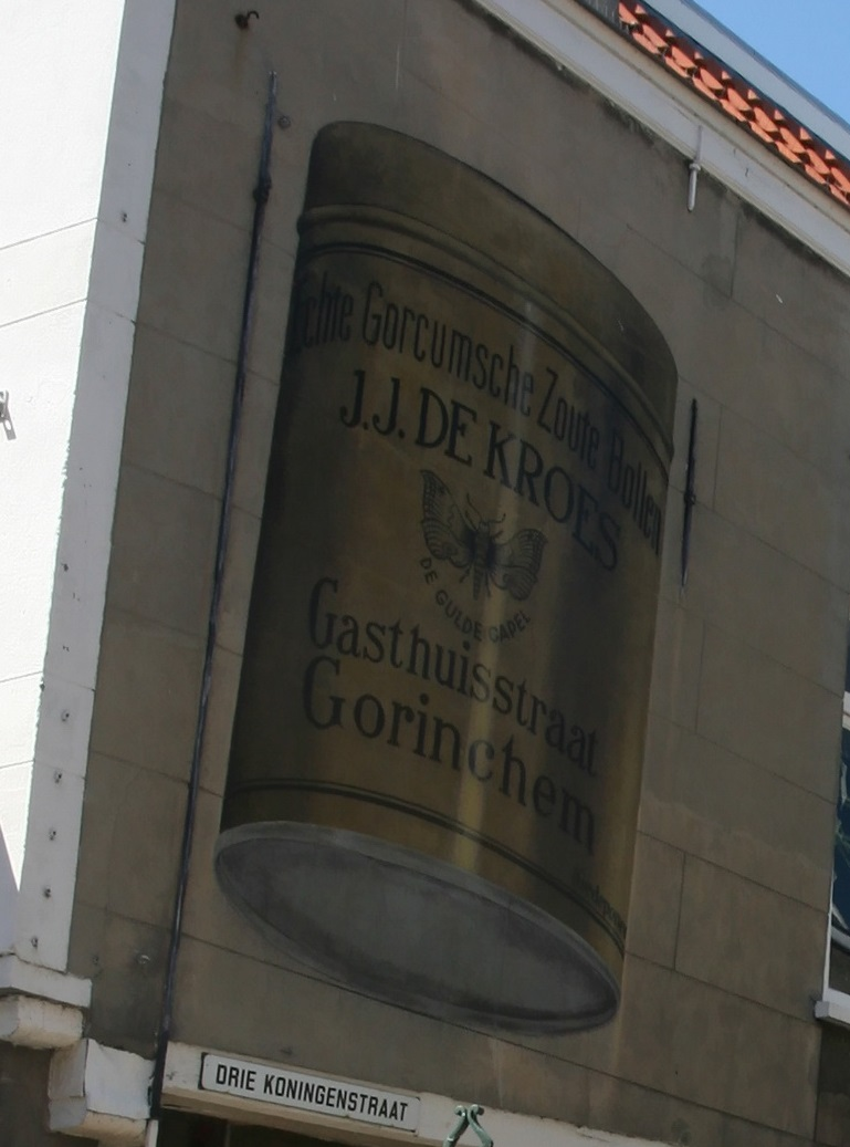 gorkum,2010